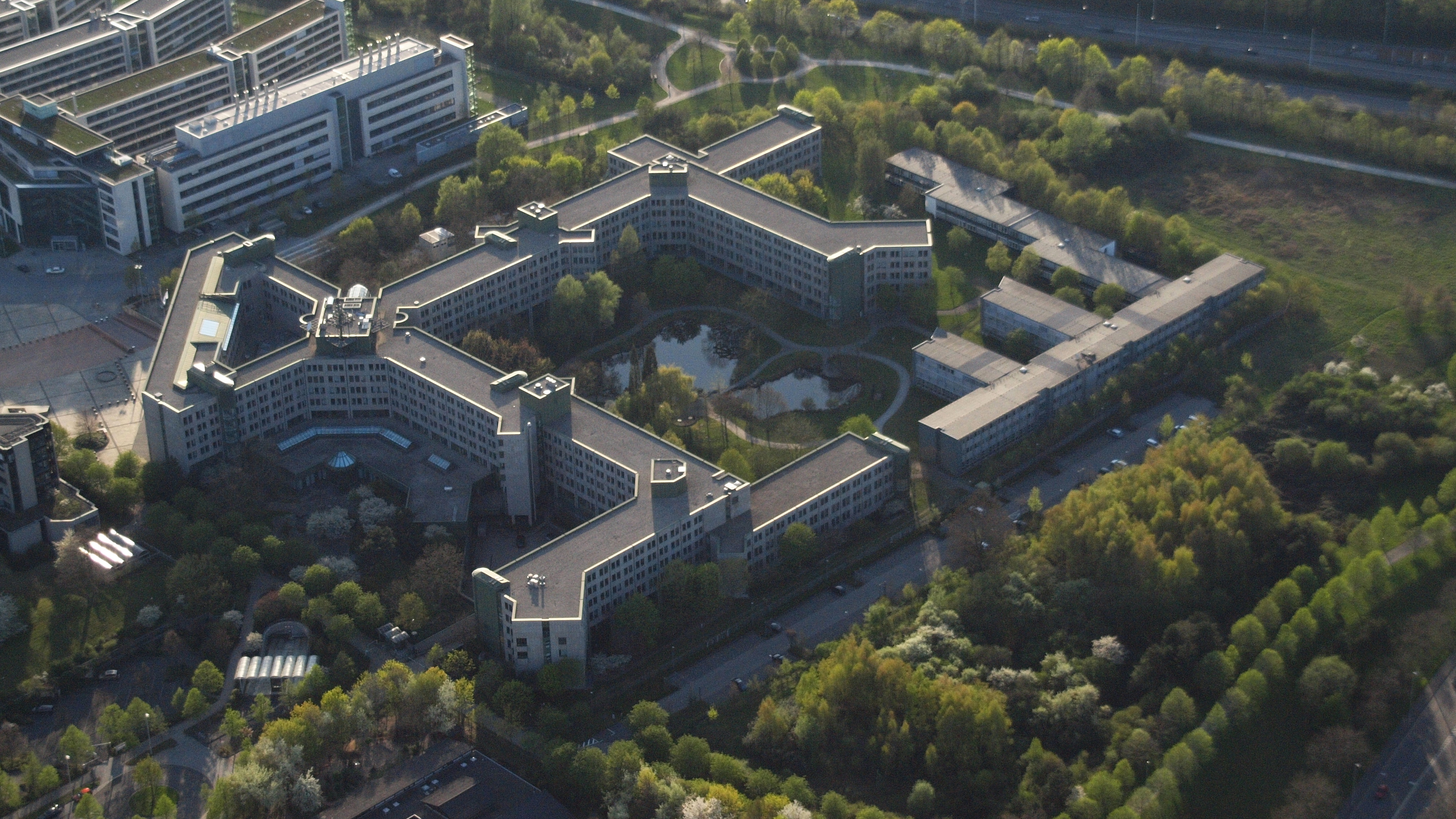 Bundesministerium für Umwelt, Naturschutz, Bau und Reaktorsicherheit (zum Zeitpunkt der Aufnahme: Bundesministerium für Umwelt, Naturschutz und Reaktorsicherheit), Bonn-Hochkreuz: Luftaufnahme